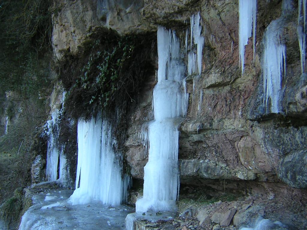 La Font del Collet, a l'hivern (Monistrol de Calders, Moianès)